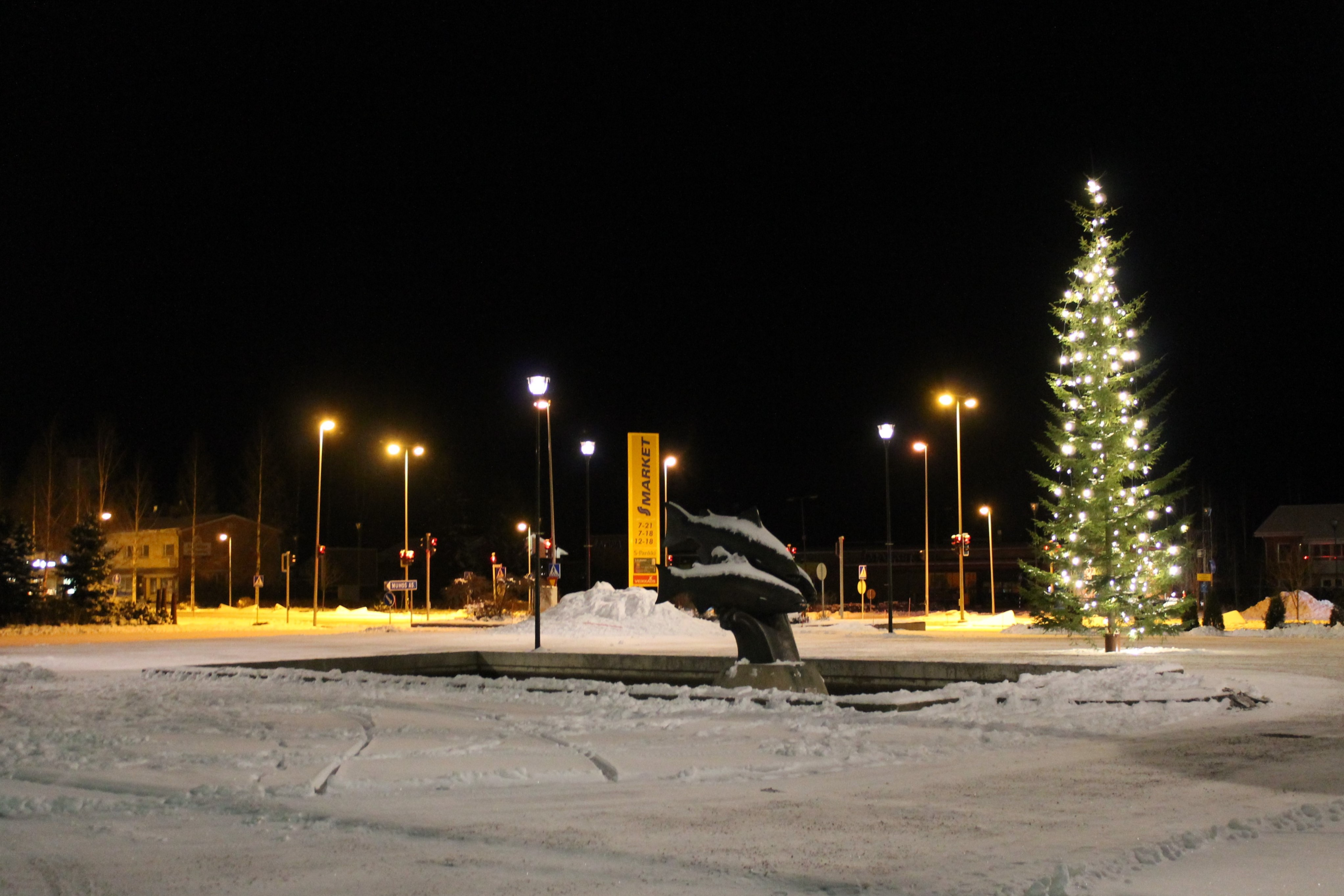 Muhoksen keskustaa pääaukiolta katsottuna.